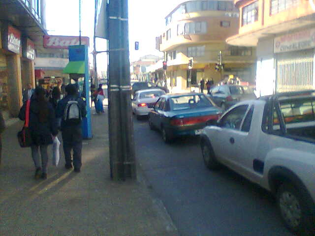 Calle principal de la comuna de los ángeles